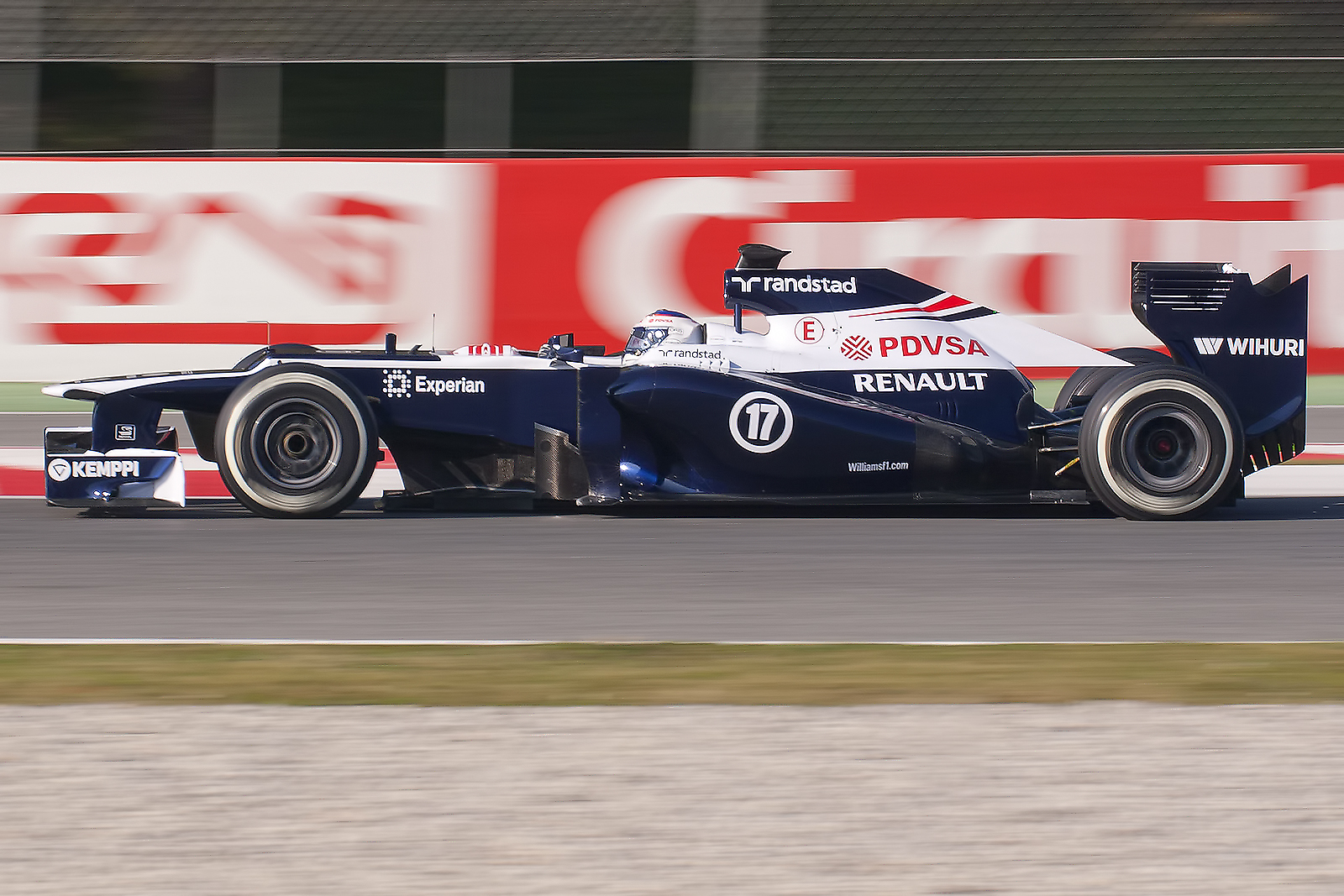 F1 Tests - Circuit de Catalunya, Spain.